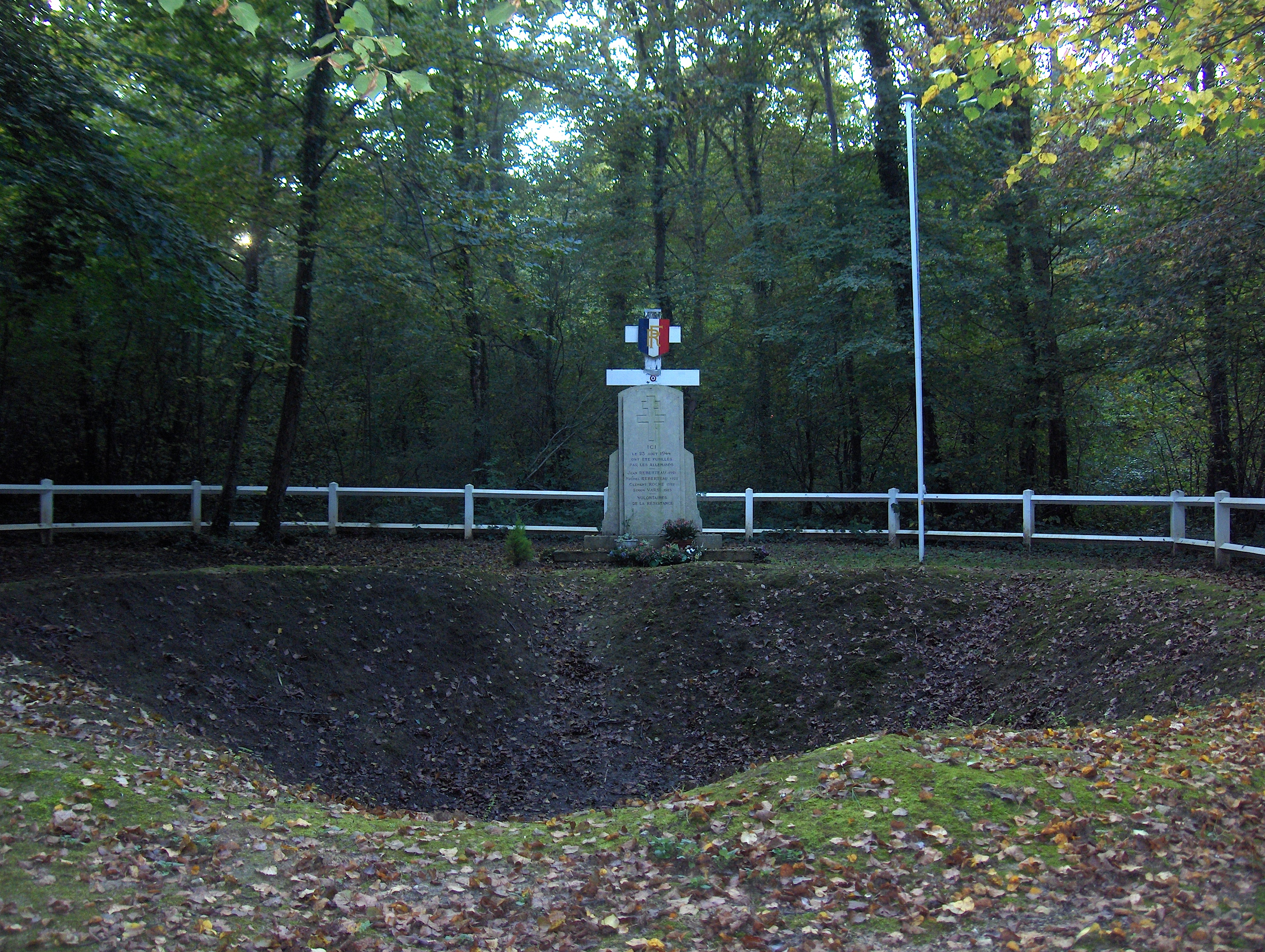 Monuments aux quatre jeunes résistants fusillées en forêt de L'Isle-Adam (Val-d'Oise) le 23 août 1944